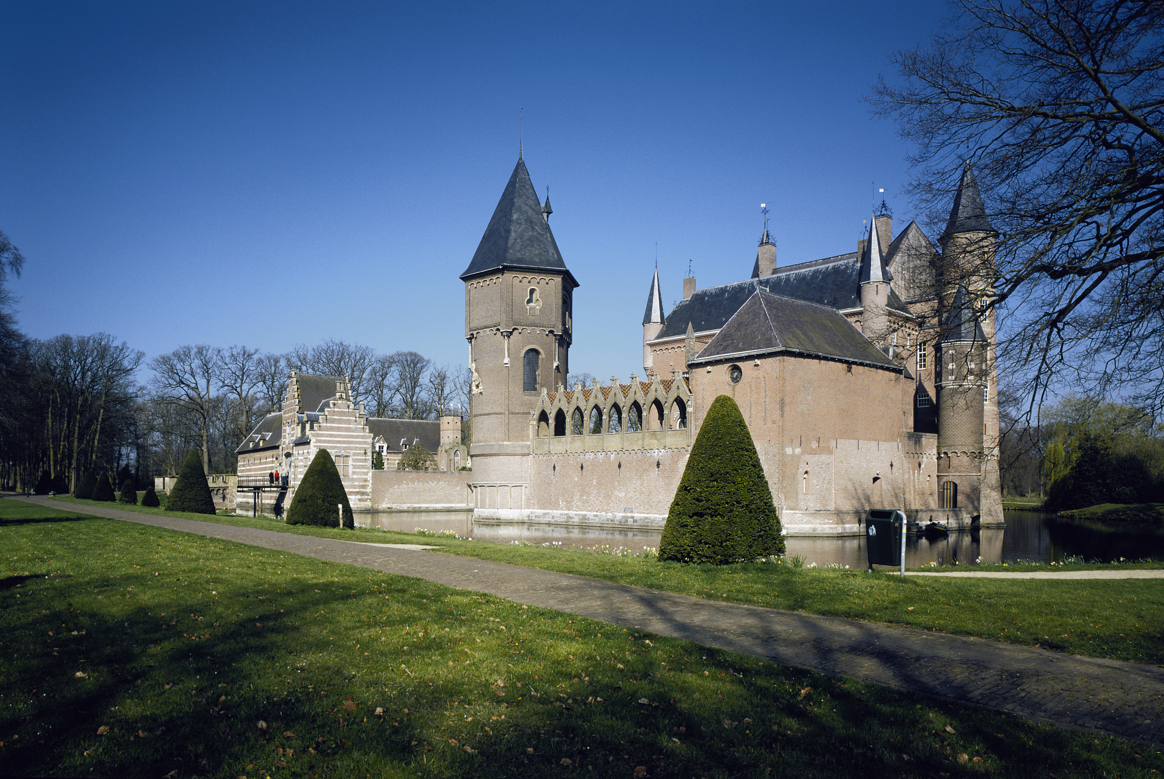 Kasteel Heeswijk: Overzicht van kasteel Heeswijk gezien vanaf het gazon (opmerking: Gefotografeerd voor Kanjers eerste ronde)